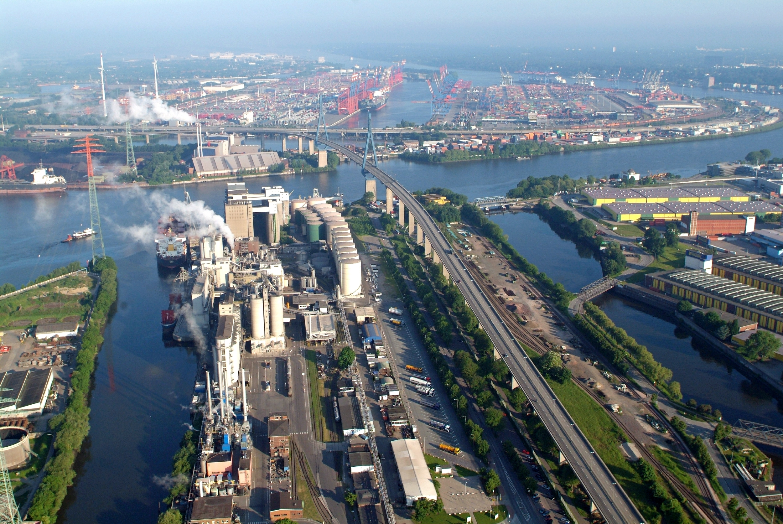 Projekt Heißluftballon